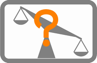 天秤と中立的な観点